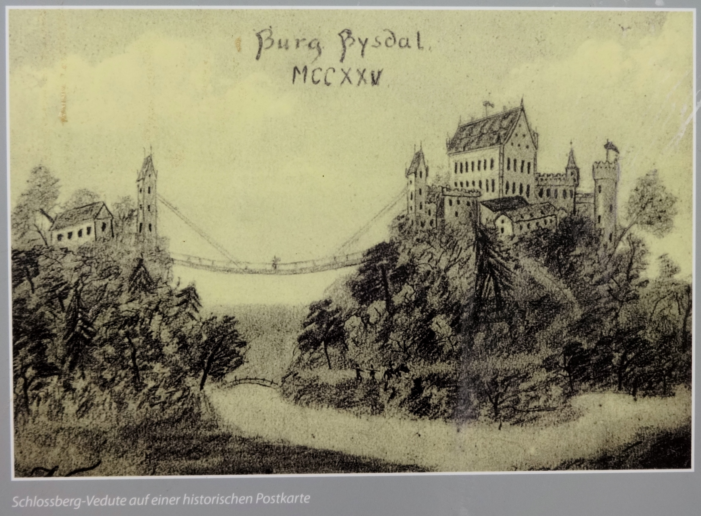 Informationstafels rund um den Schlossberg in Biesenthal im Landkreis Barnim